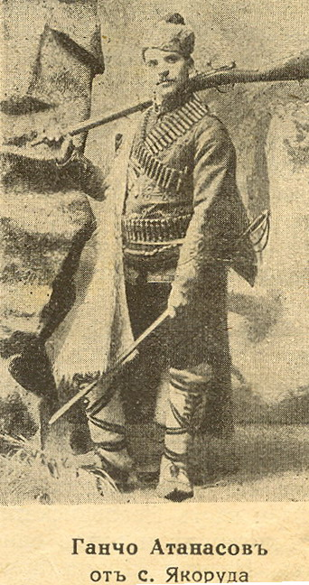 Ганчо Атанасов, четник на Васил Чекаларов в Сборната рота на Македоно-одринското опълчение в 1913 година.